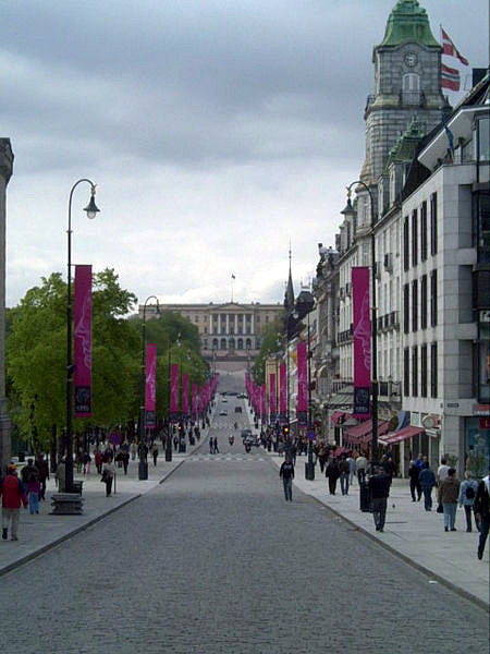 Karl Johans gate, Oslo. Sett fra Egertorget